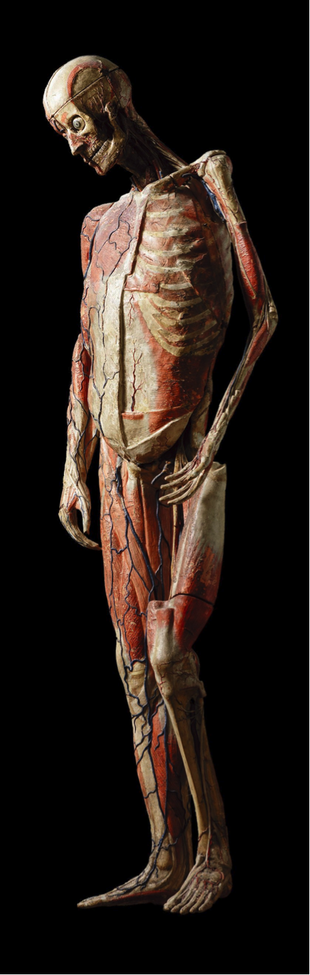 Modèle anatomique de Jérôme Auzoux